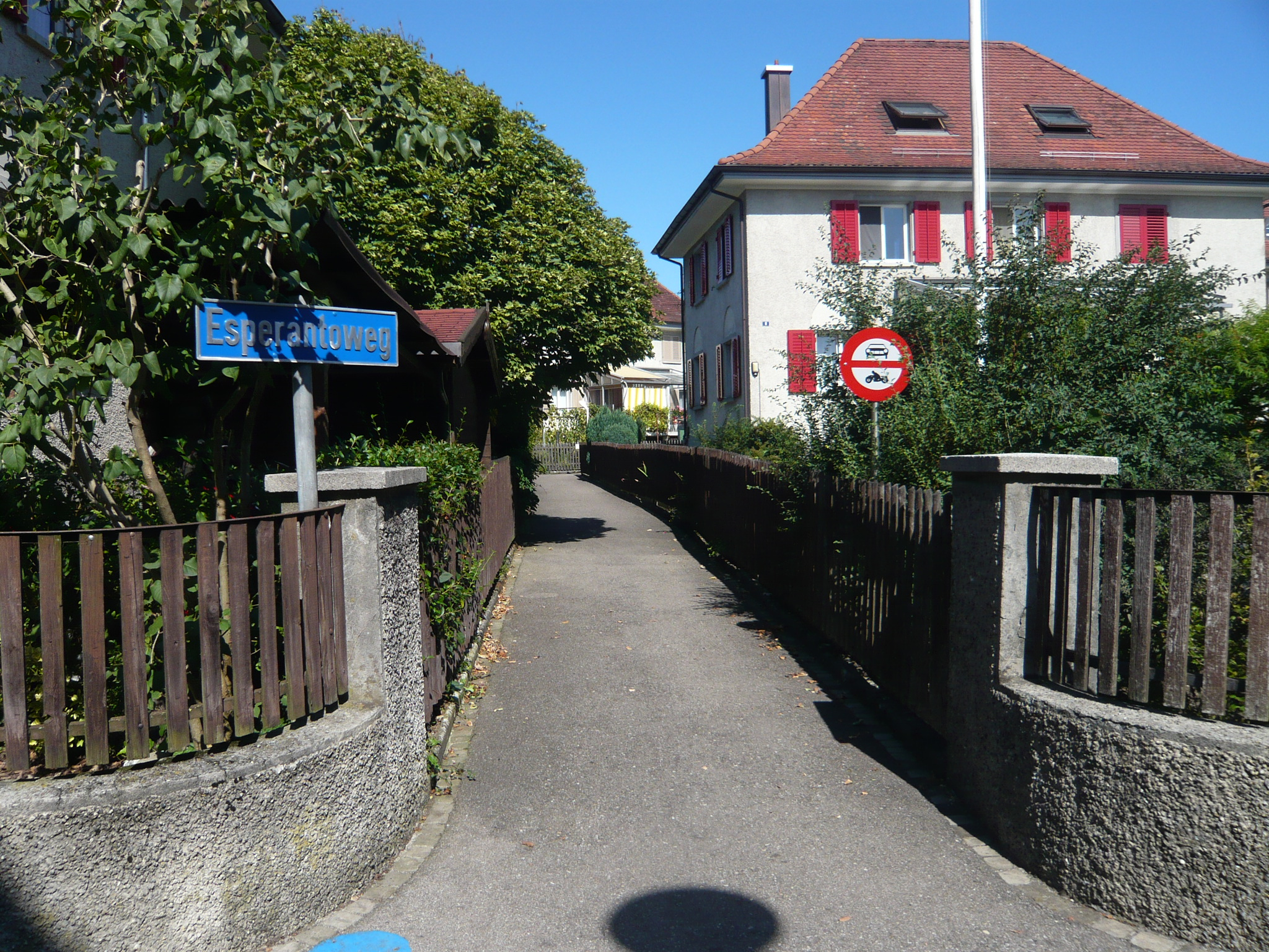 Chemin "Esperanto" dans la localité de Romanshorn, canton de Thurgovie, Suisse